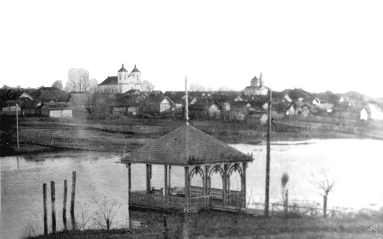 Беларуская (тарашкевіца): Бобр (Bobr), рака Бобр. Касьцёл і царква